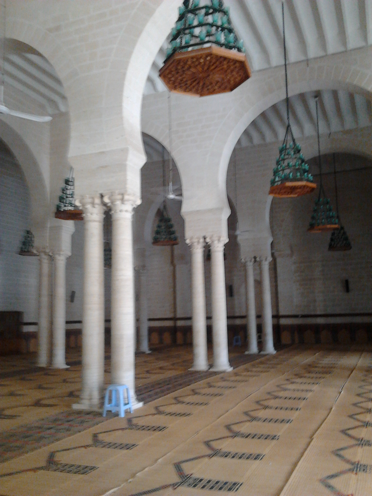 Le grand mosquée de Mahdia (mosquée Fatimide)